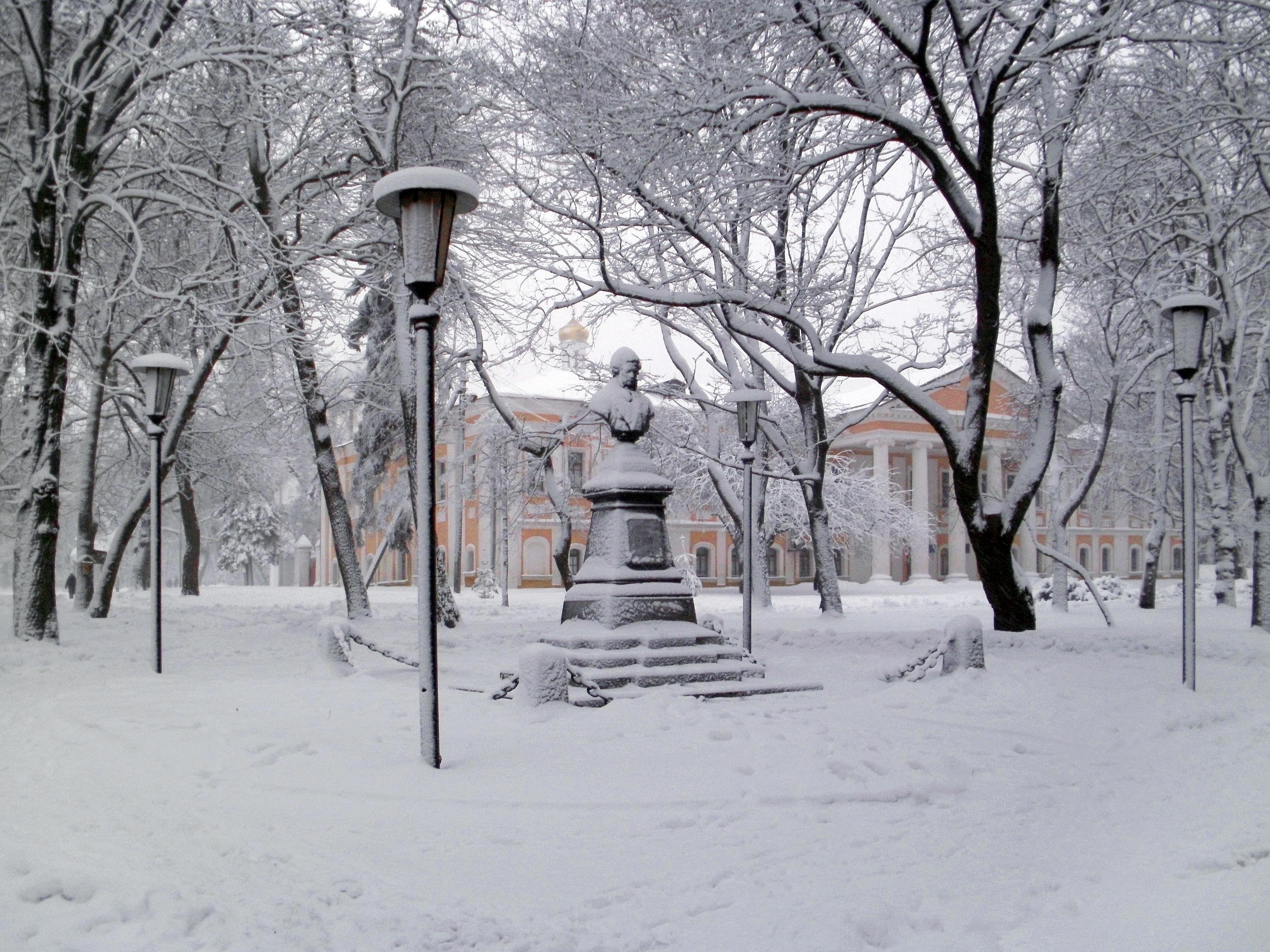 Чернігів. Пам'ятник Пушкіну та будинок архiєпископа